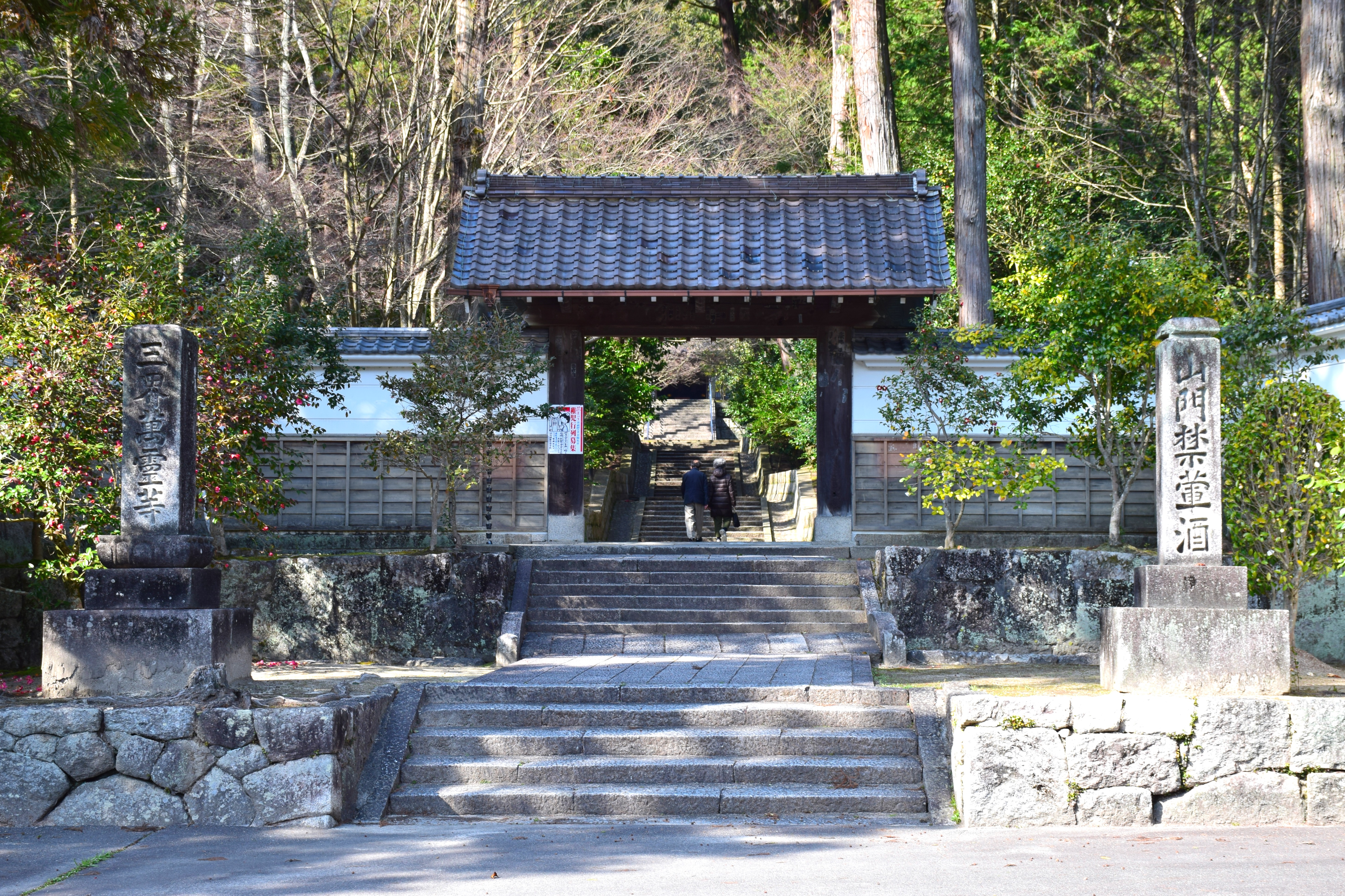 雲興寺山門